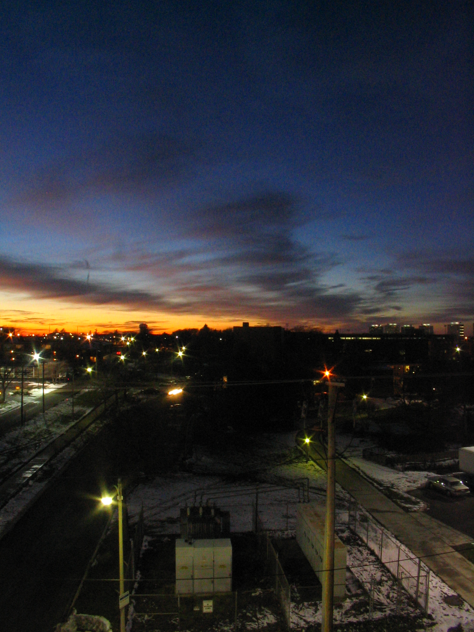 Winter Sunset in DeKalb IL